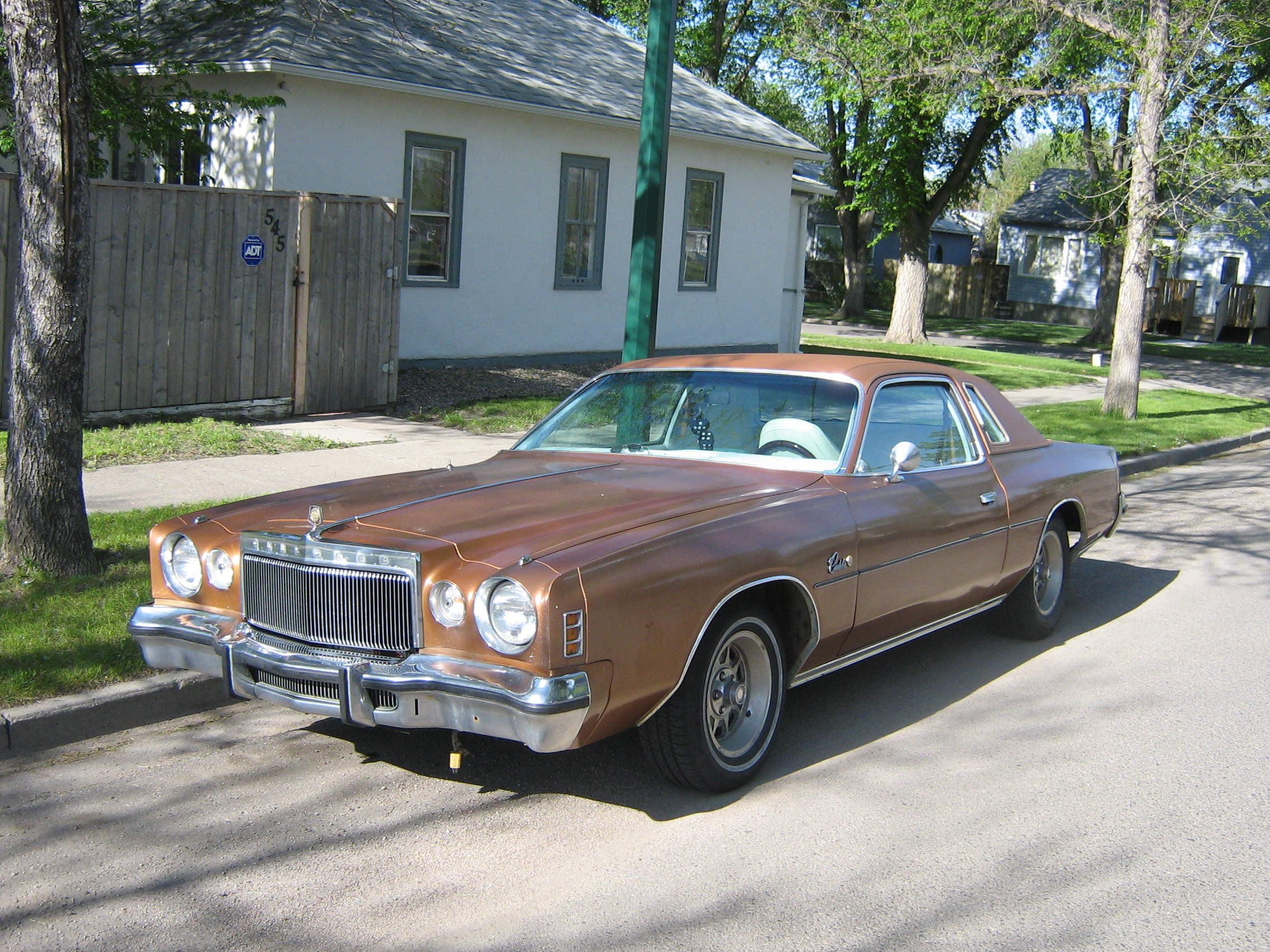 1976 Chrysler Cordoba